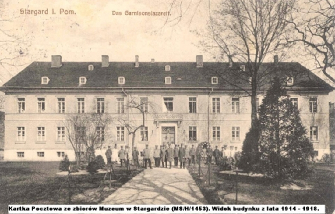 Stargard, 1914-1918 r. Szpital Garnizonowy (Garnison-Lazarett lub Standort-Lazarett), a od roku 1945 służył jako siedziba posterunku